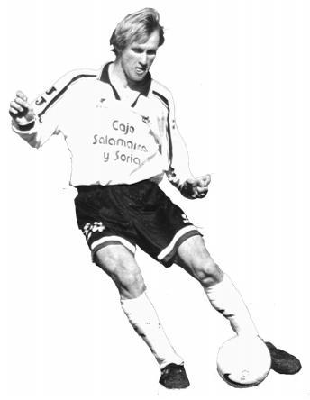 Futbolista